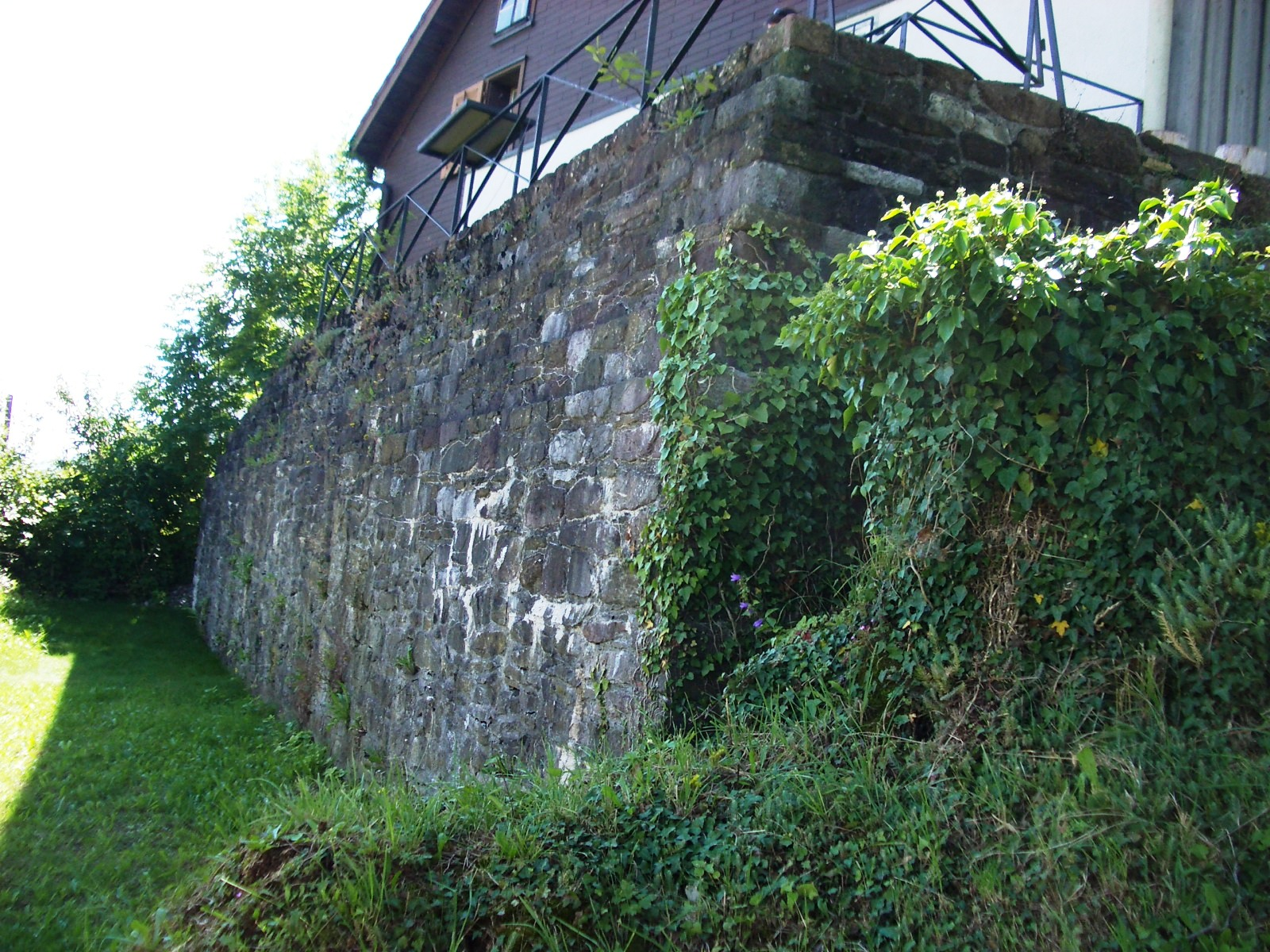 Römischer Wachturm, Filzbach GL, Schweiz